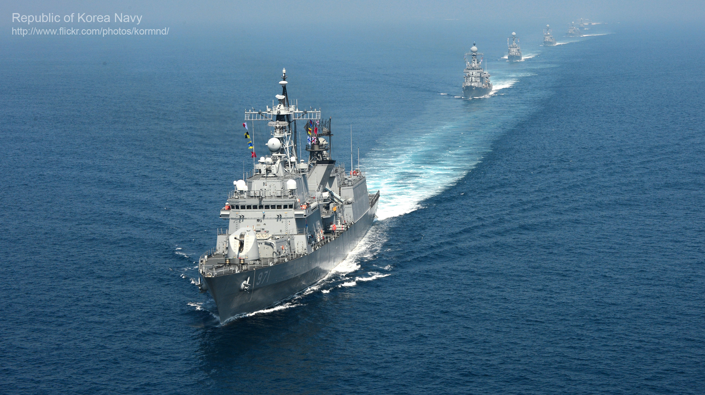 '13. 6.24. 동해 해상에서 6.25 상기 해상기동훈련을 실시하였다 촬영자 : 장석훈